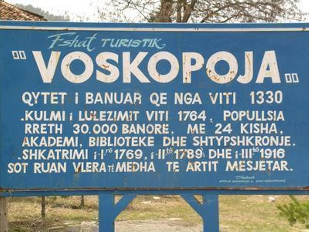 Voskopoja